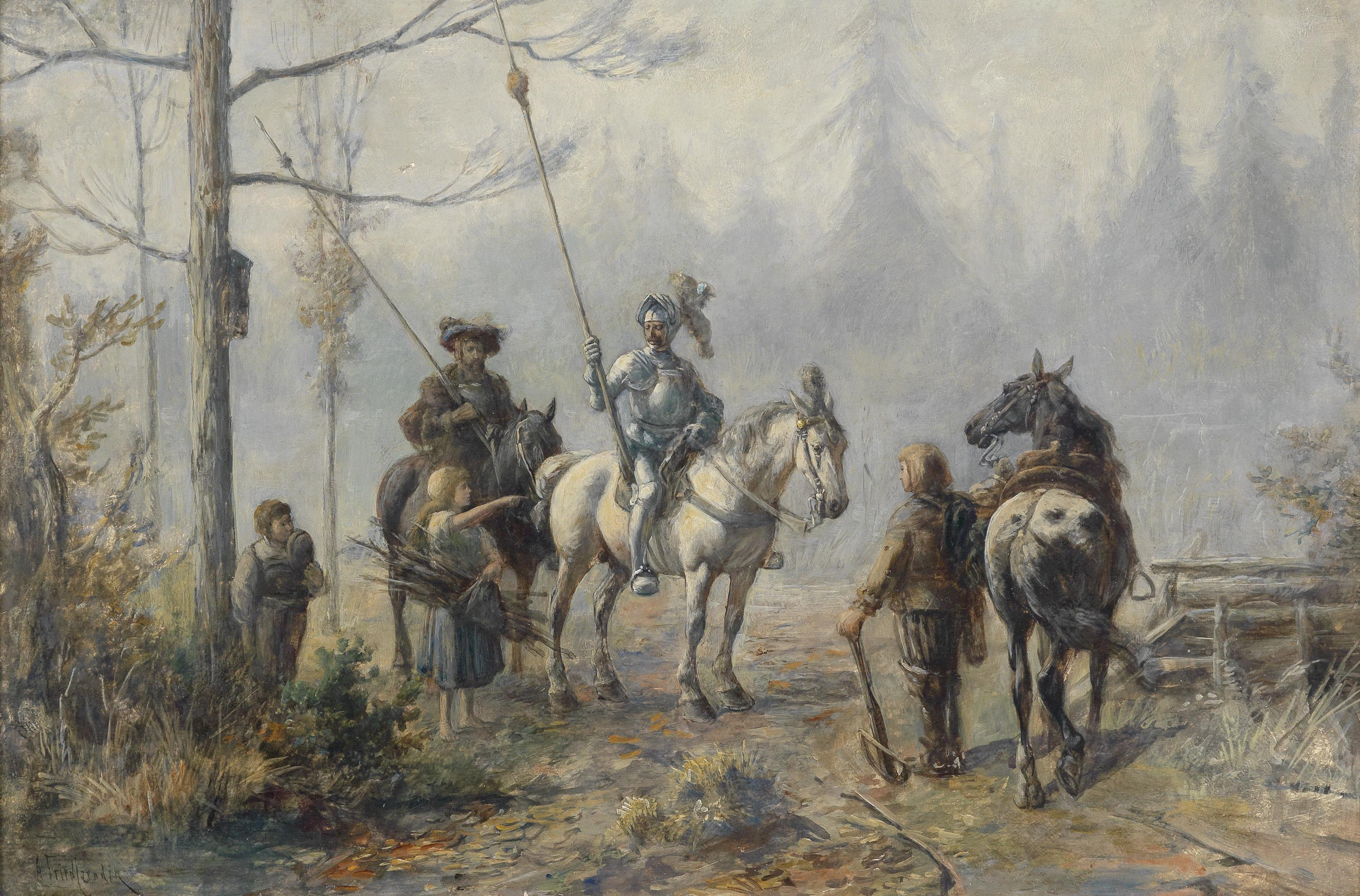 Ritter fragt Reisigsammler nach dem Weg